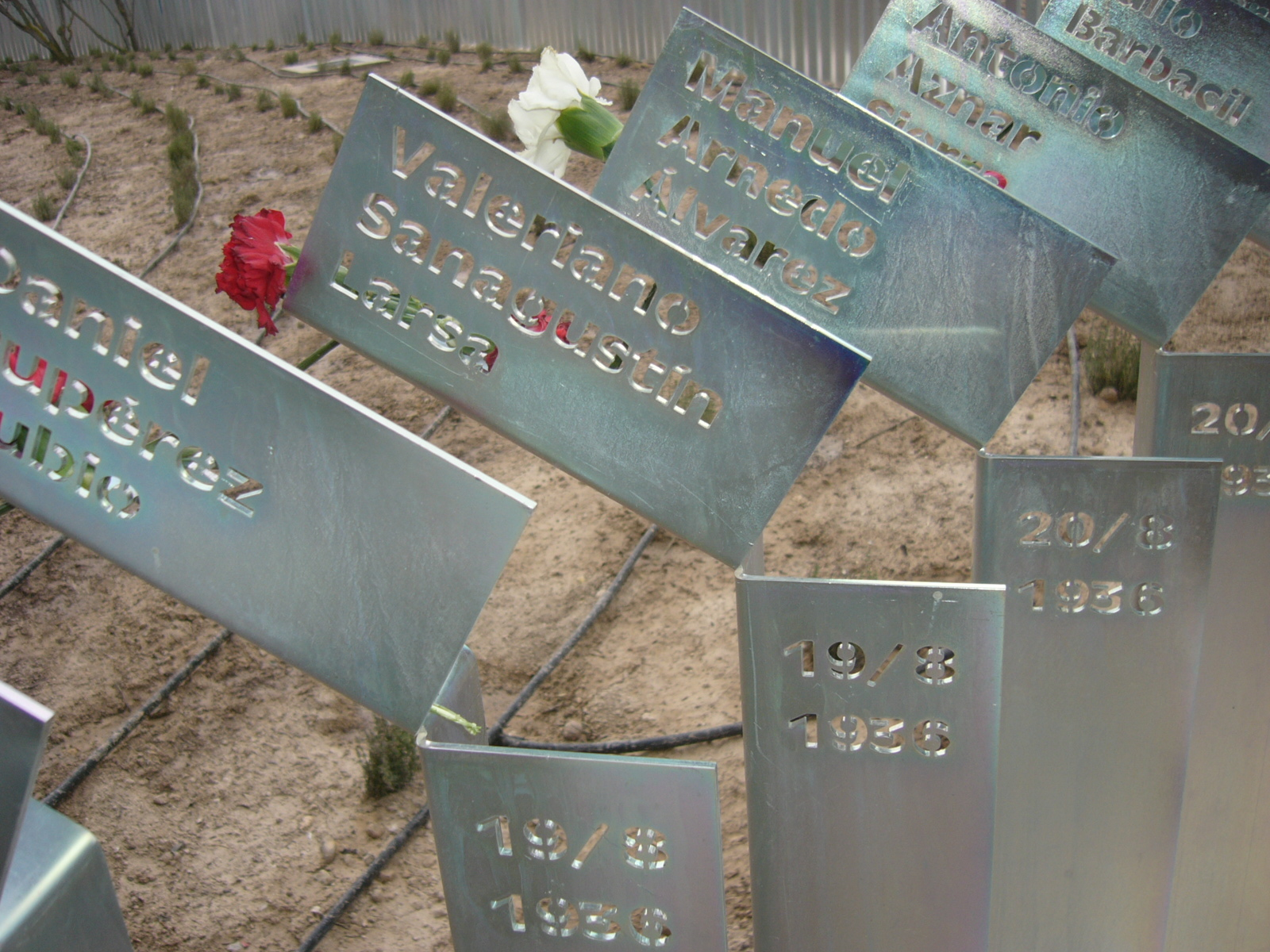 Monumento en recuerdo a los fusilados en el cementerio de Torrero, Zaragoza, en 1936 y años siguientes